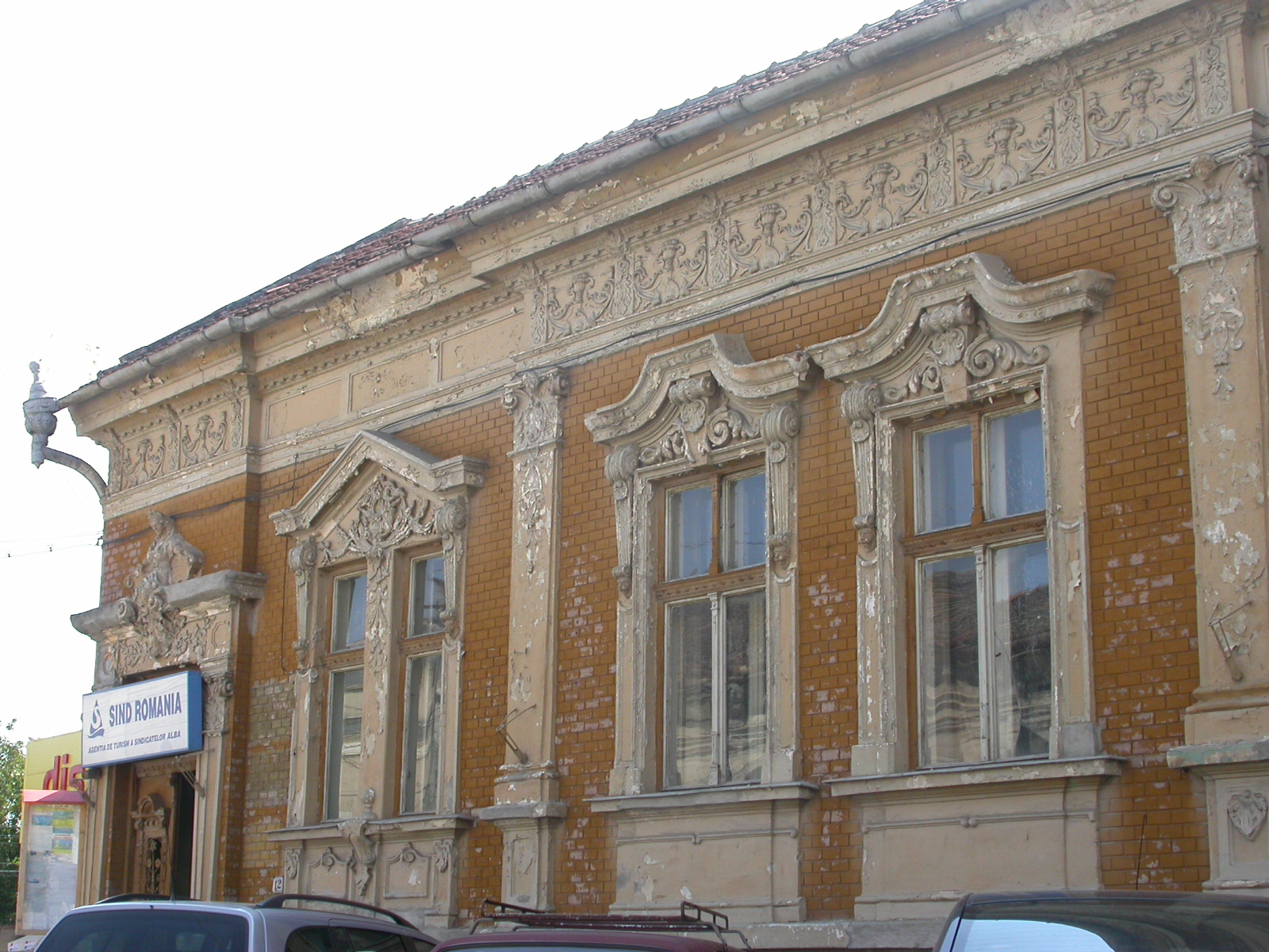 Casă, sf. sec. XIX